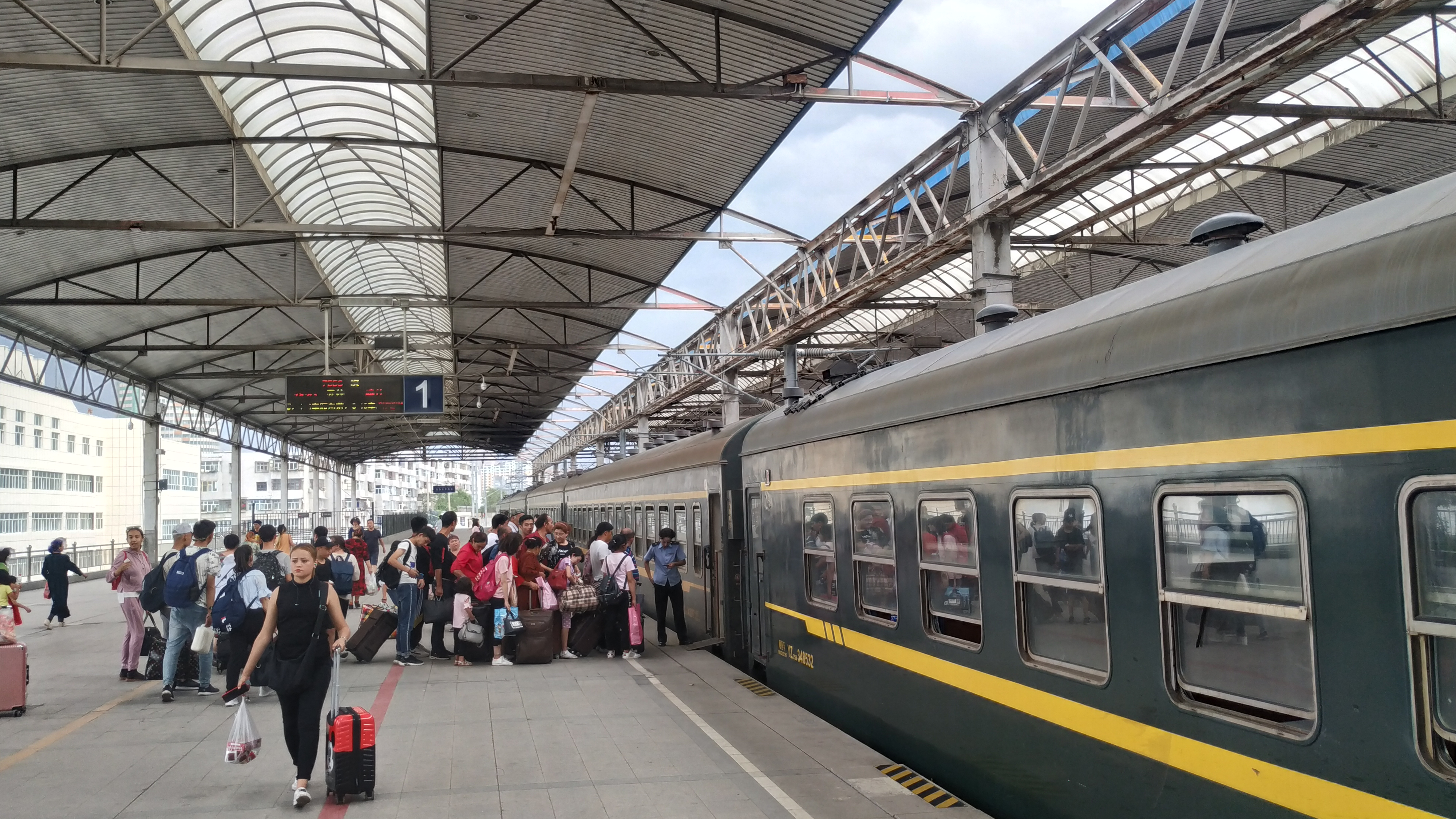 中文（中国大陆）: 乌鲁木齐南站1站台